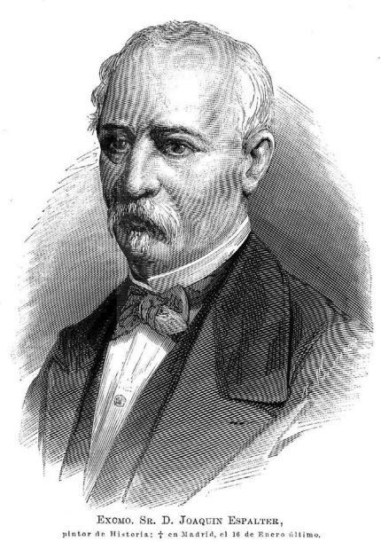 Retrato de Joaquín Espalter